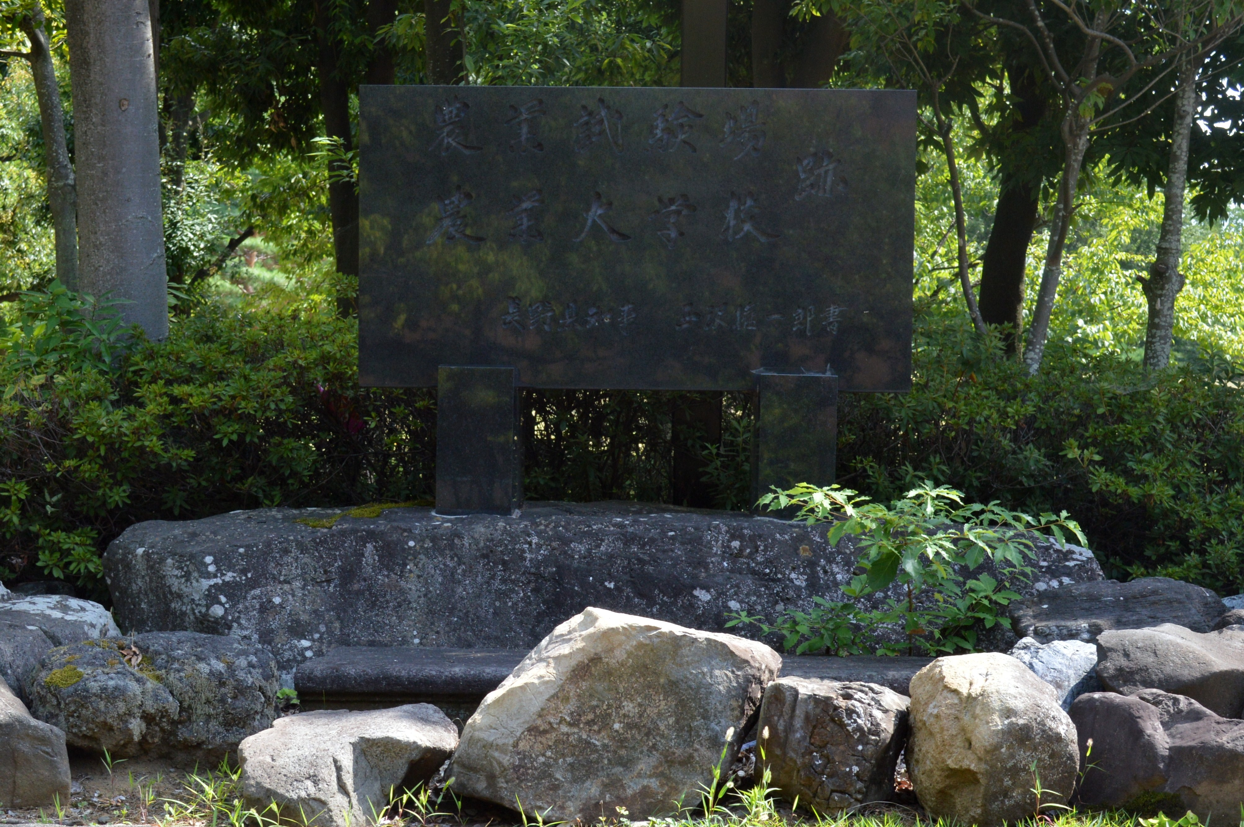 長野市の若里公園。